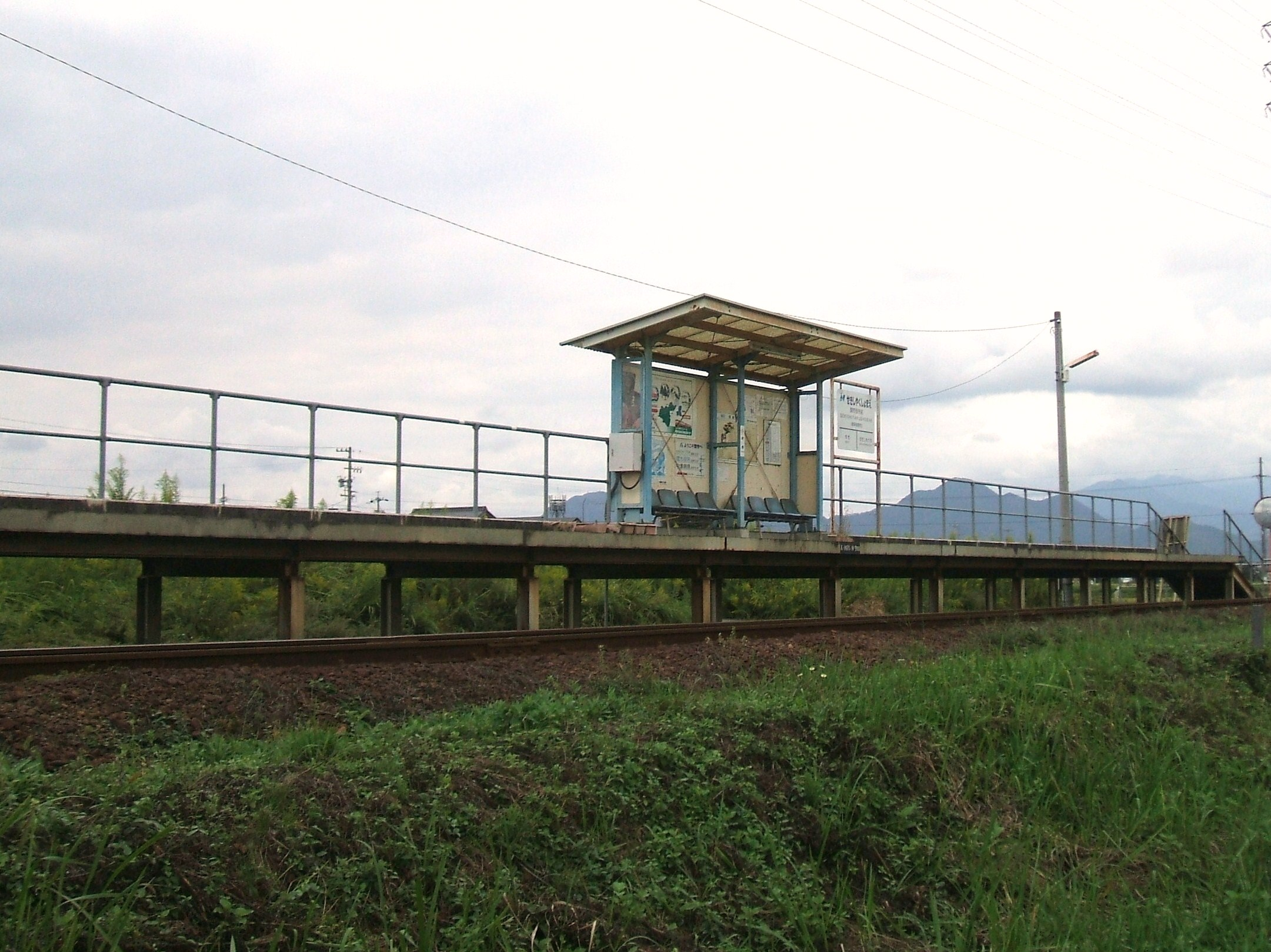 関市役所前駅。